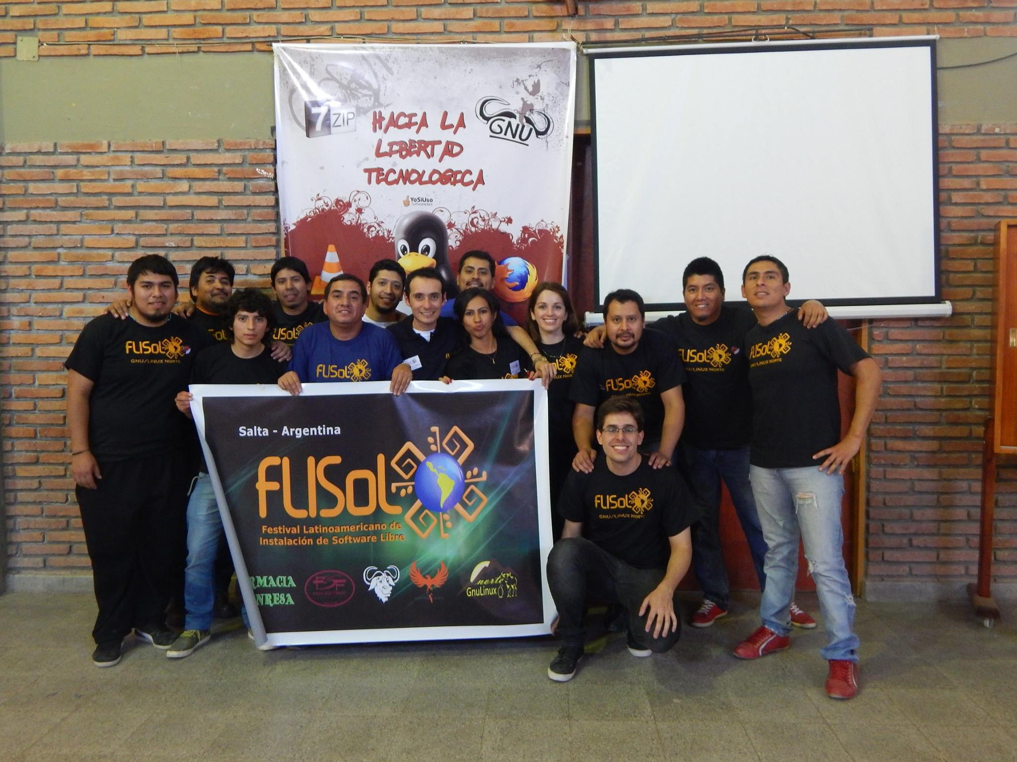 FLISoL (Festival Latinoamericano de Instalación de Software Libre) en Salta, Argentina.